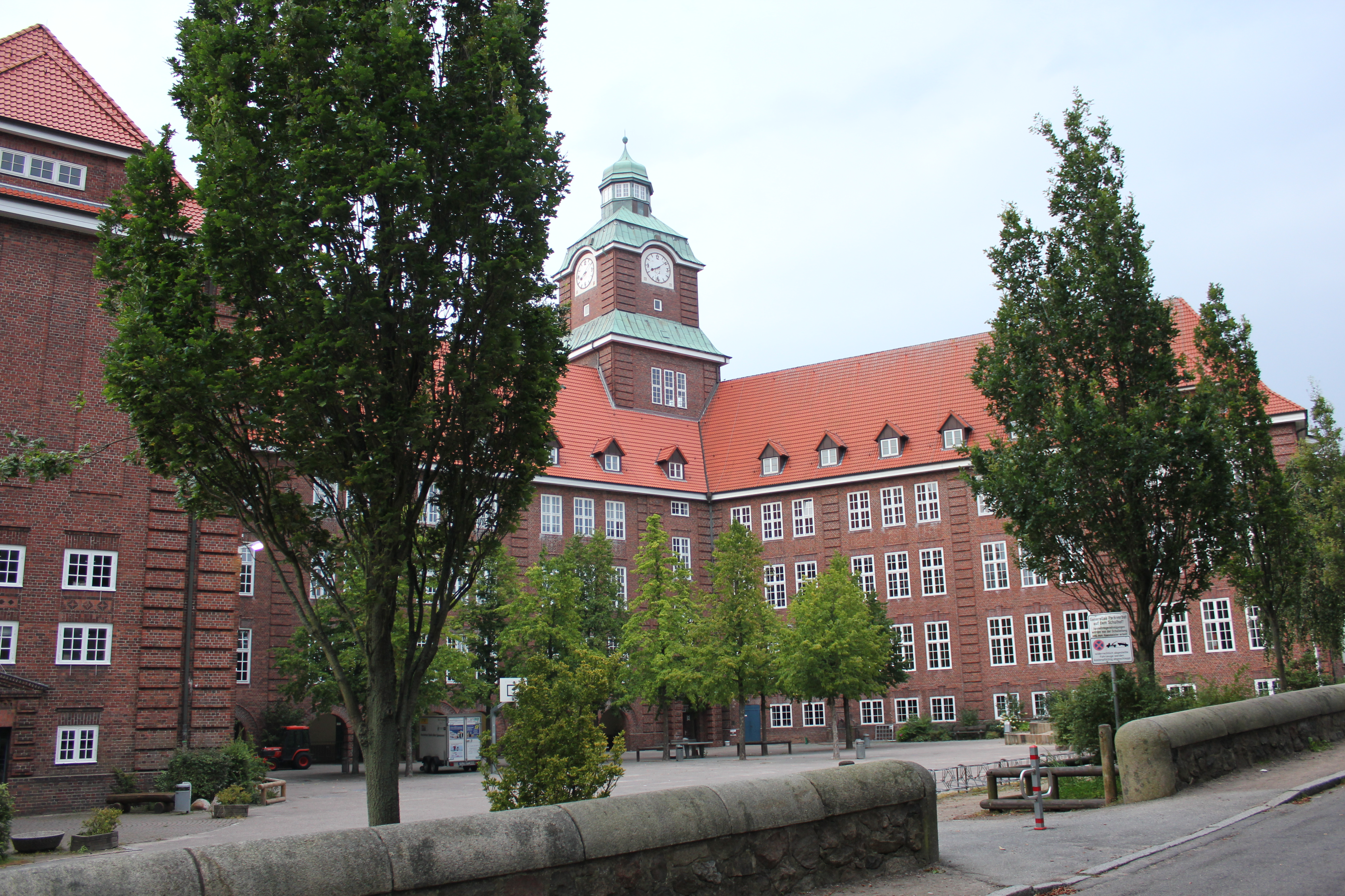 Altes Gymnasium Flensburg